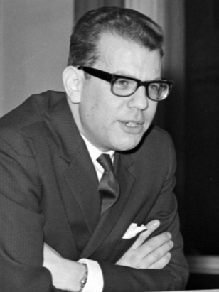 Advokat bakom en talarstol i Uppsala.